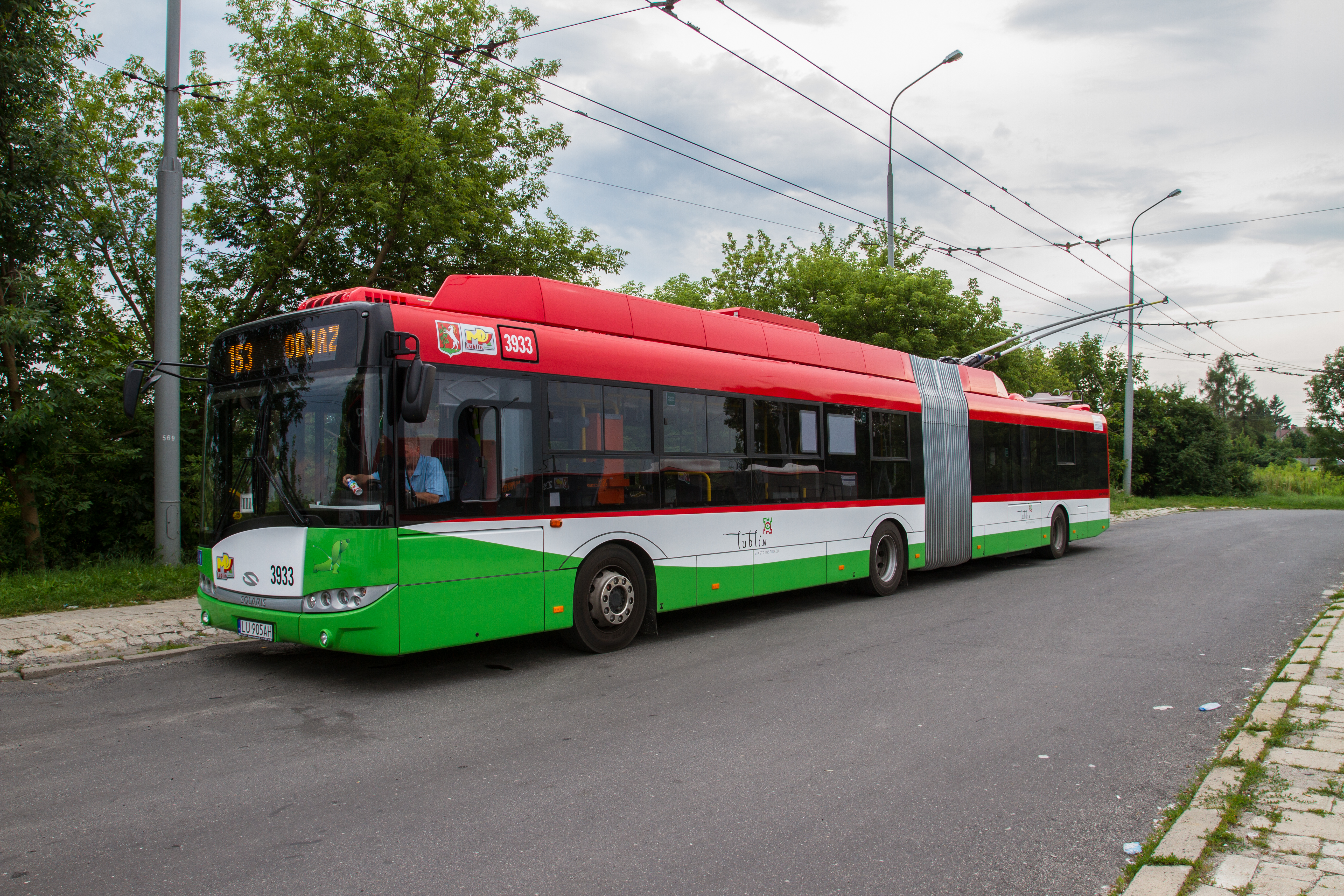 Trolejbus Solaris Trollino 18m